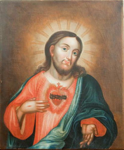 Музей: Гродзенскі дзяржаўны музей гісторыі рэлігіі Тып: выяўленчыя крыніцы Від: жывапіс Прадметнае імя: абраз Назва/аўтарская назва: "Хрыстос з палаючым сэрцам" Аўтары: невядомы; Матэрыялы: палатно; Тэхналогіі стварэння: жывапіс алейны; Дата стварэння: канец XVIIІ - пачатак ХІХ ст. Месца стварэння: Беларусь Памеры: h =65,5 см; b =55 см